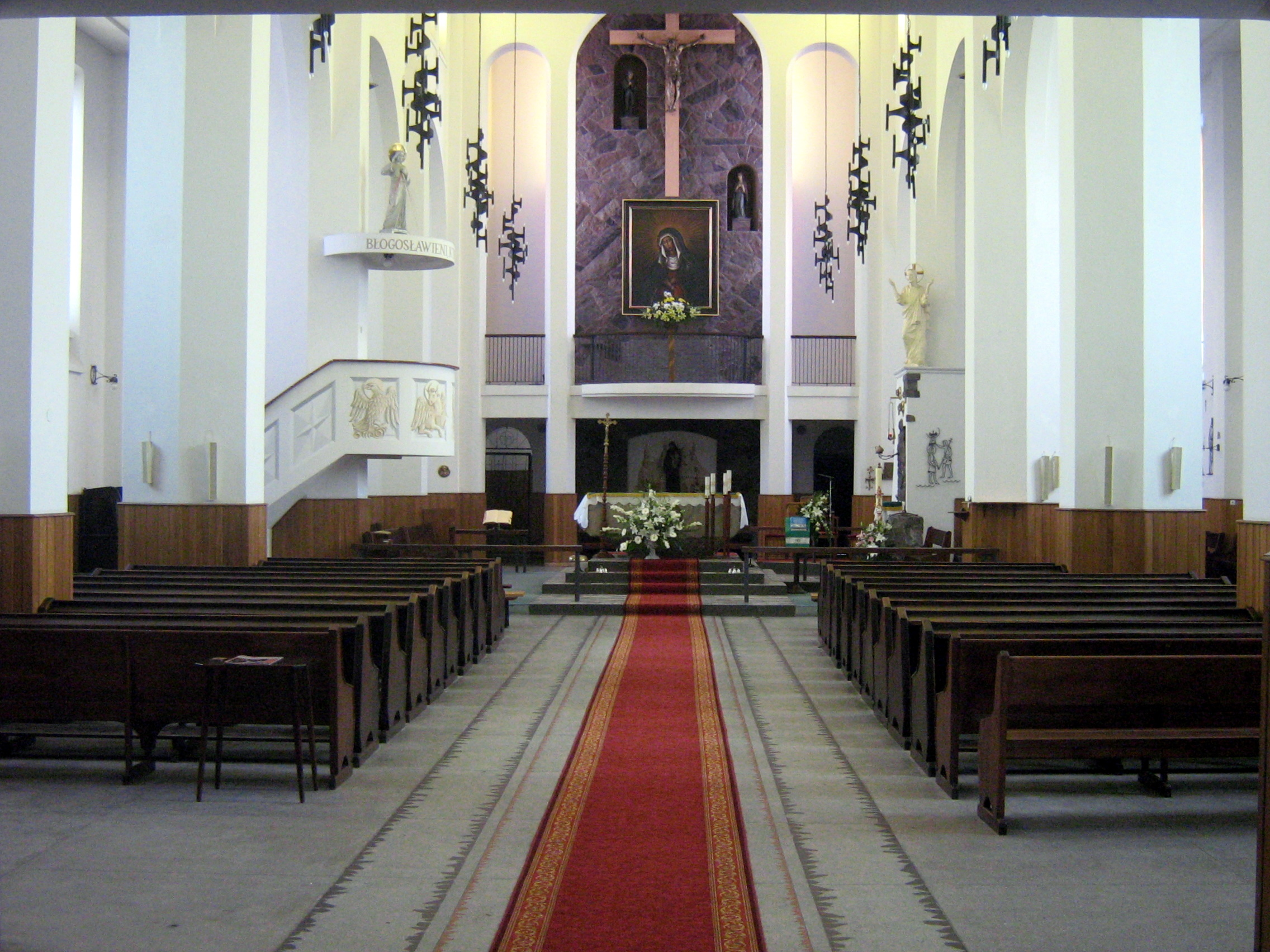 Kościół Najświętszej Marii Panny Matki Miłosierdzia w Wasilkowie.